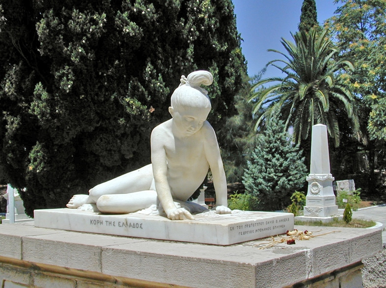 Missolonghi ou Messolongi est connue pour avoir été le lieu de la mort du poète Byron venu soutenir la révolte des Grecs contre les Turcs. Le siège de Missolonghi est un épisode clé de la guerre d'indépendance grecque dans les années 1820, plus par son importance politique que militaire car il contribua largement à faire basculer l’opinion européenne en faveur de l’Indépendance grecque. La ville a été prise par les Turcs en 1826 après un très long siège au cours duquel périrent de nombreux habitants dont le héros Markos Botzaris (1789-1823). Delacroix, Chateaubriand, Hugo, David d'Angers ont soutenu les Grecs dans leur lutte. voir aussi